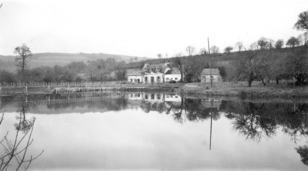 Ecluse et maison éclusière de Penn ar Pont en Lothey vers 1940 (sur l'Aulne canalisée, partie du canal de Nantes à Brest); la maison éclusière se trouve en fait sur le territoire de la commune de Pleyben, car elle est située sur la rive droite de l'Aulne